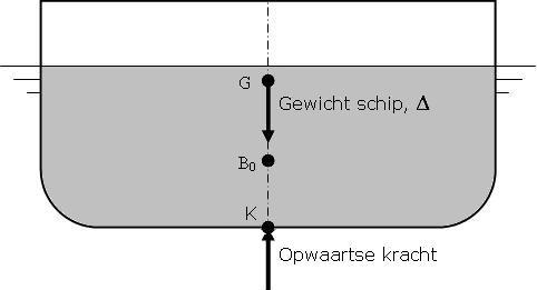 Eigen ontwerp.